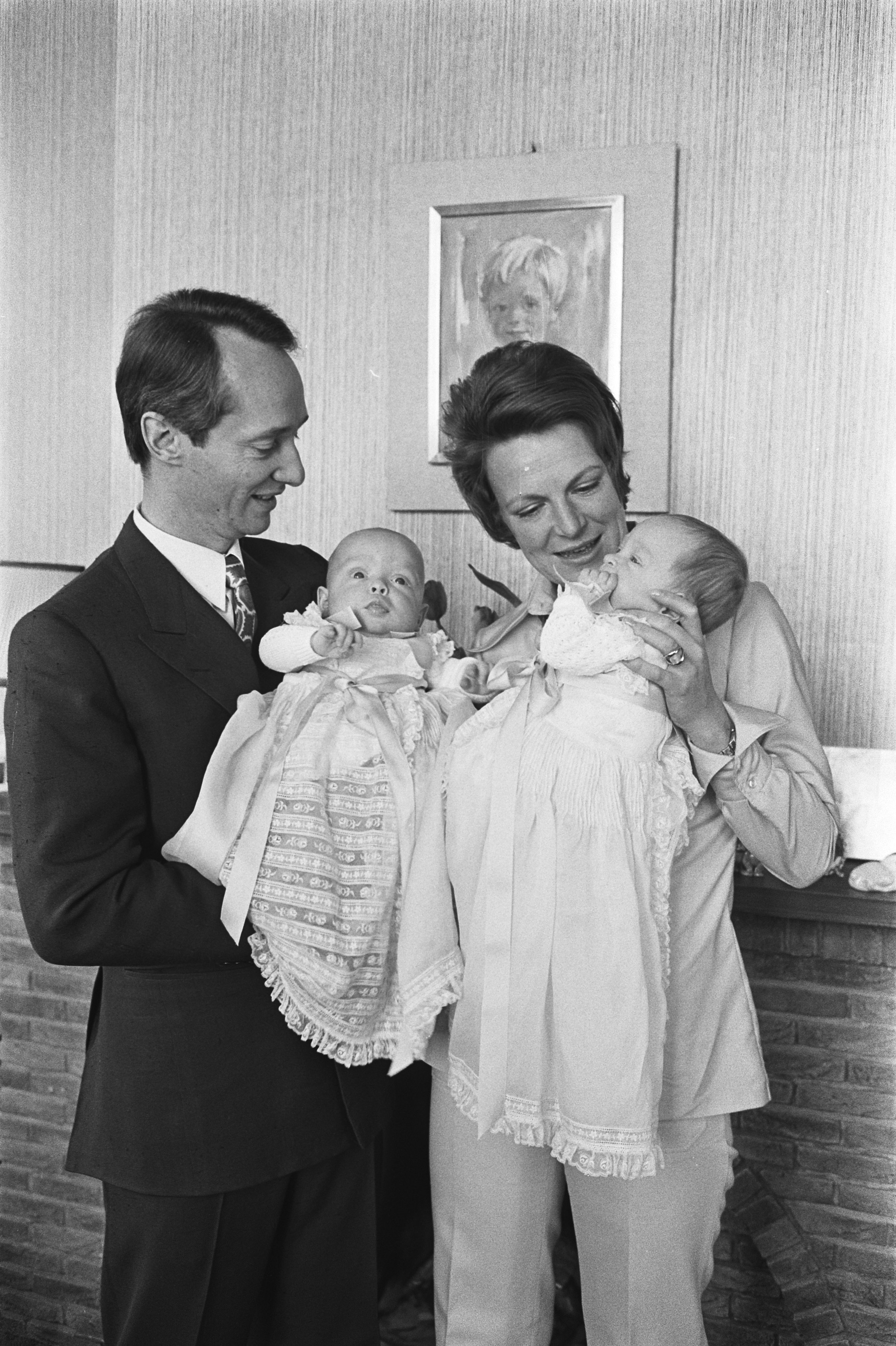 Collectie / Archief : Fotocollectie Anefo Reportage / Serie : Prinses Irene, Carlos Hugo en de tweeling op paleis Soestdijk Beschrijving : koninklijk huis, prinsessen, prinsessen, kinderen, groepsportretten, Carlos Hugo, prins van Bourbon van Parma, Irene, prinses, Jaime Bernardo, prins van Bourbon van Parma, Margarita, prinses, Utrecht Datum : 1973 Locatie : Baarn, Utrecht Trefwoorden : groepsportretten, kinderen, koninklijk huis, prinsessen, prinsessen Persoonsnaam : Carlos Hugo, prins van Bourbon van Parma, Irene, prinses, Jaime Bernardo, prins van Bourbon van Parma, Margarita, prinses Fotograaf : Herschel, Jaap / Anefo Auteursrechthebbende : Nationaal Archief Materiaalsoort : Negatief (zwart/wit) Nummer archiefinventaris : bekijk toegang 2.24.01.05 Bestanddeelnummer : 929-0518 Reacties Geplaatst door M S Knol op 05 oktober 2017 - 14:02. Geachte Mevrouw/meneer Het jaartal bij deze foto is verkeerd. Dat moet zijn 1973 en geen 1977 daar deze baby's toen al 4 jaar oud waren. Hun geboortedatum is 13-10-1972